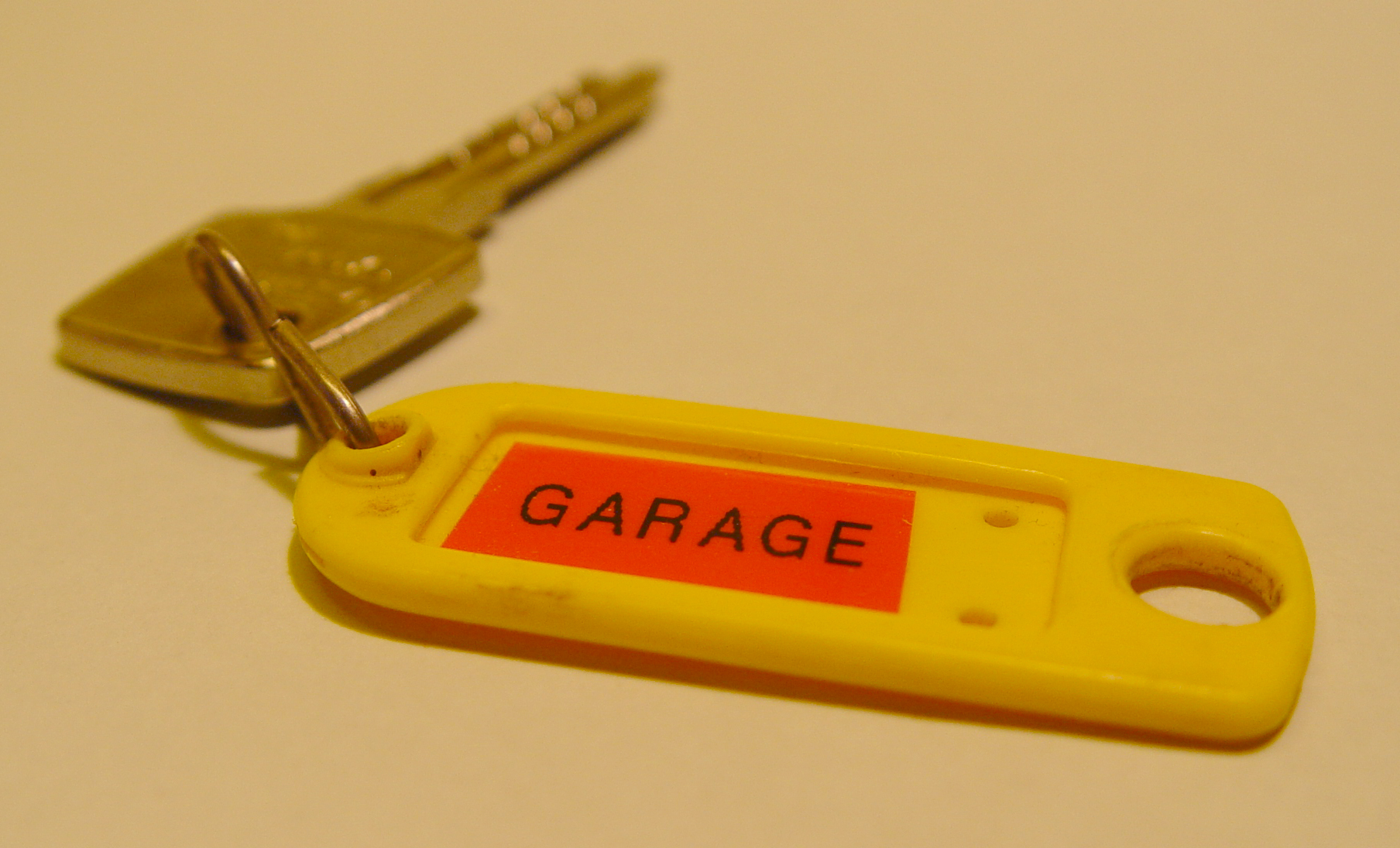 Porte-clefs.